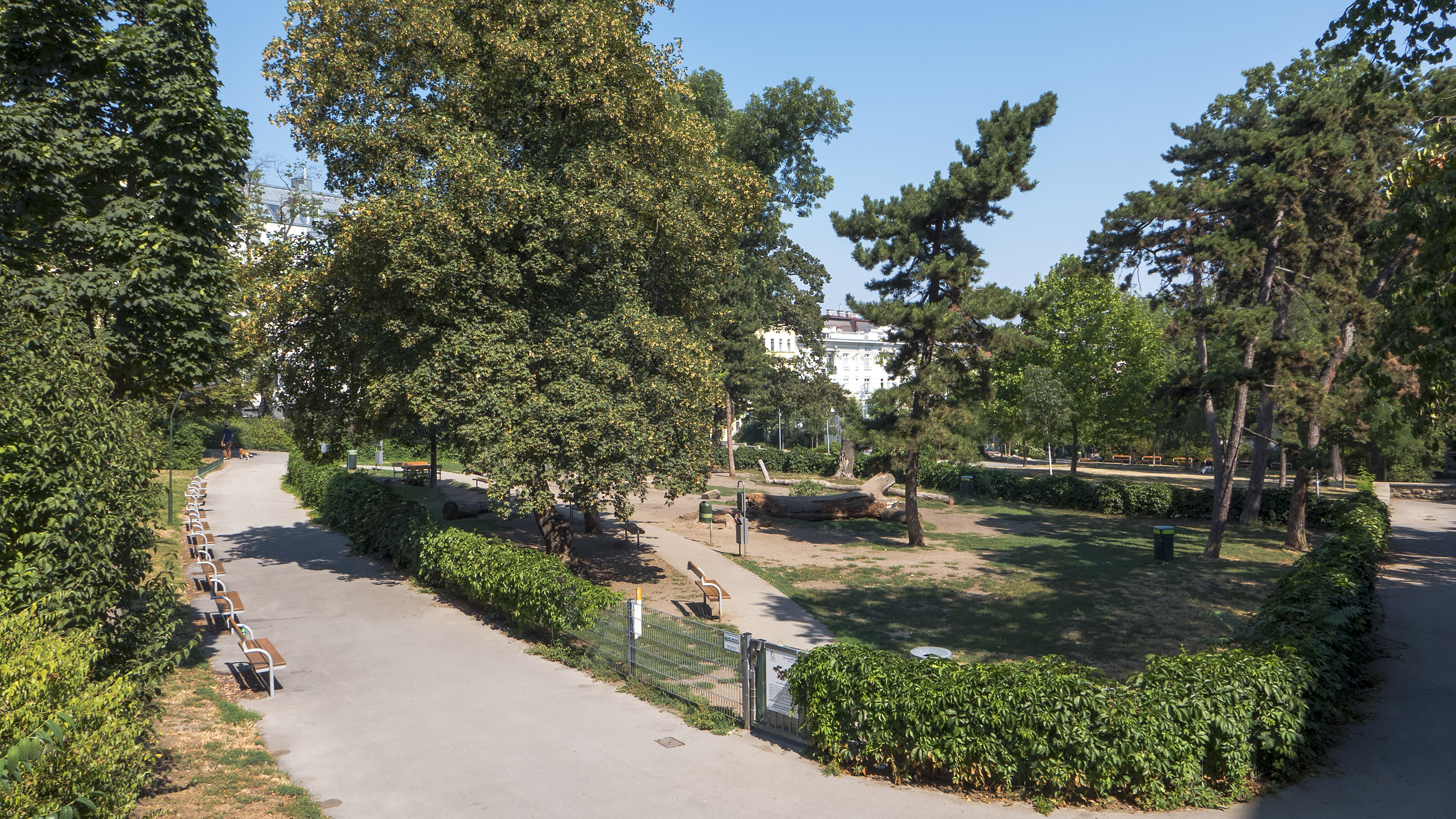 Währinger Schubertpark in Wien 18